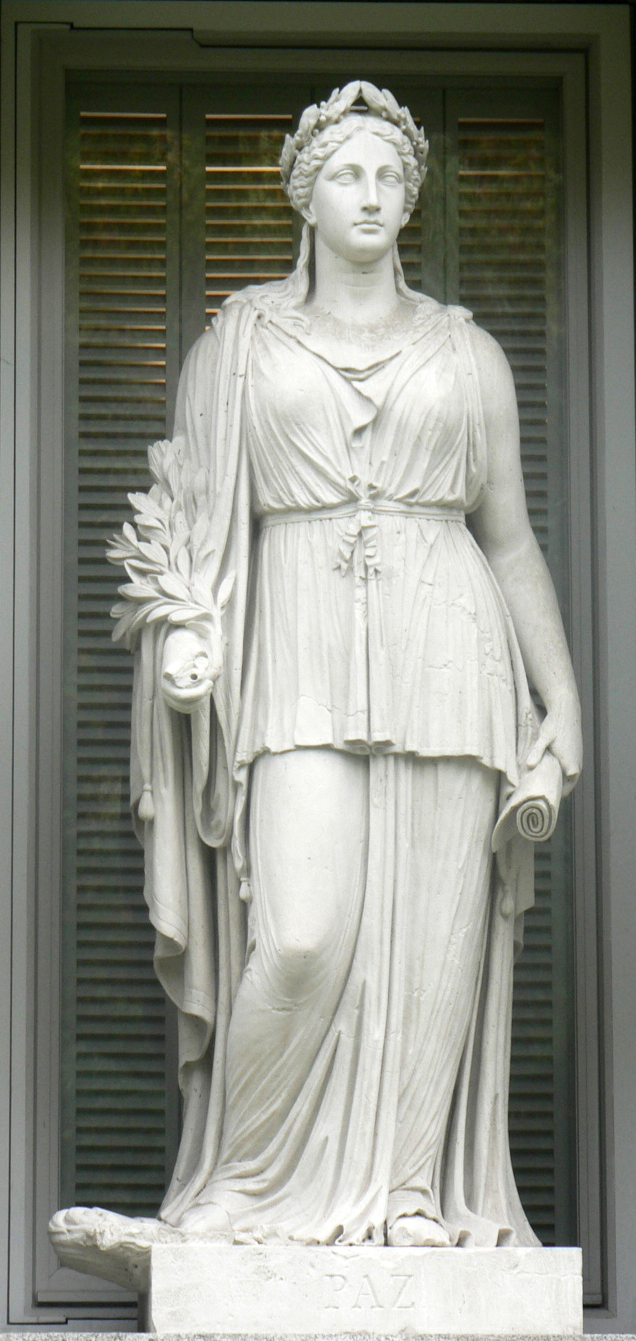 Estatua alegórica de la Paz, esculpida en mármol entre 1830 y 1836, por Valeriano Salvatierra, en la fachada del Museo del Prado, Madrid.